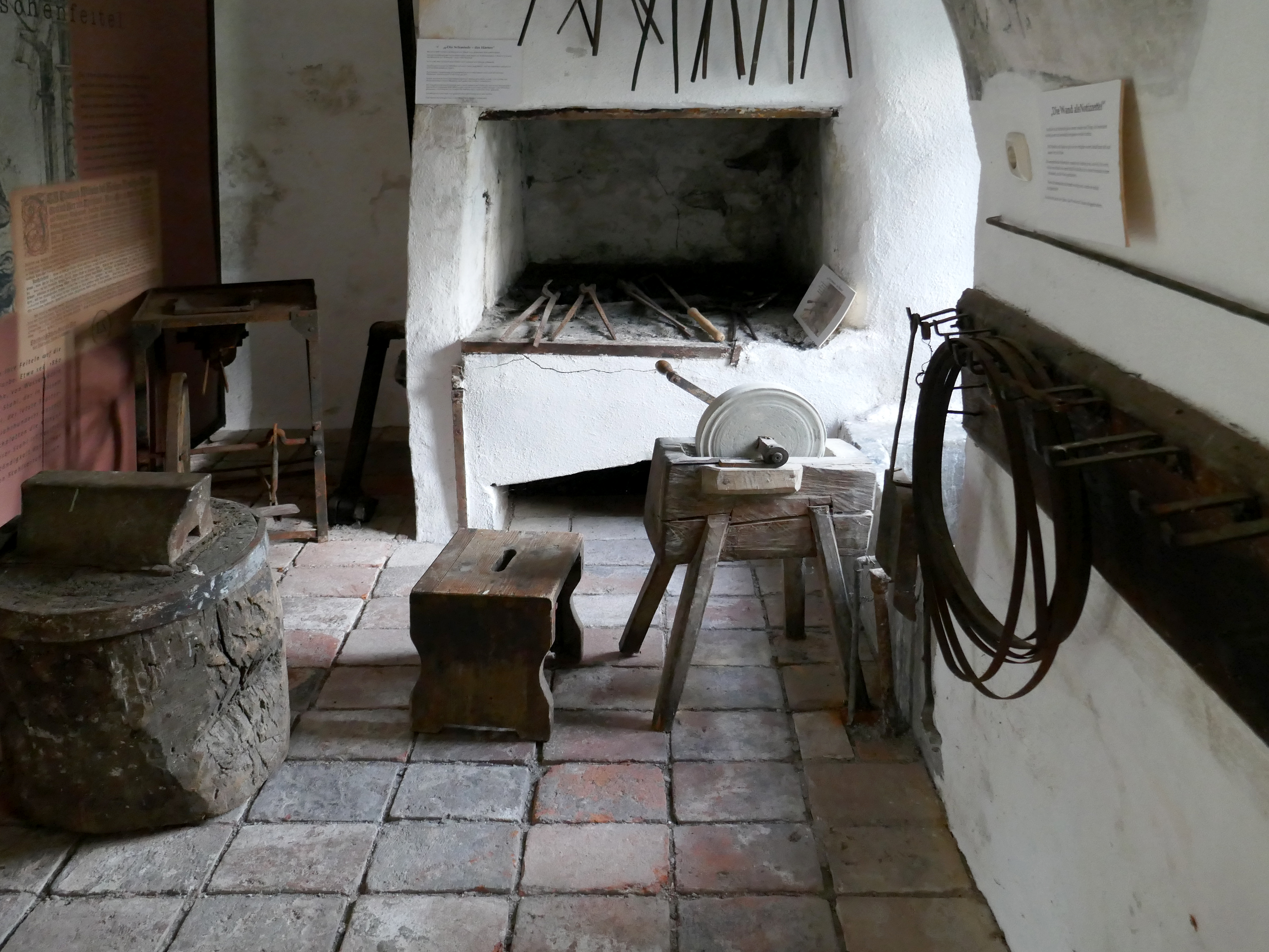 Im Tal der Feitelmacher, Trattenbach - Museum in der Wegscheid - Ausstellung.